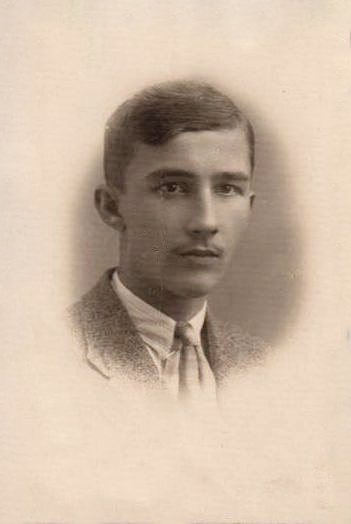 Artur Linowski (zdjęcie pochodzące ze zbiorów rodzinnych).